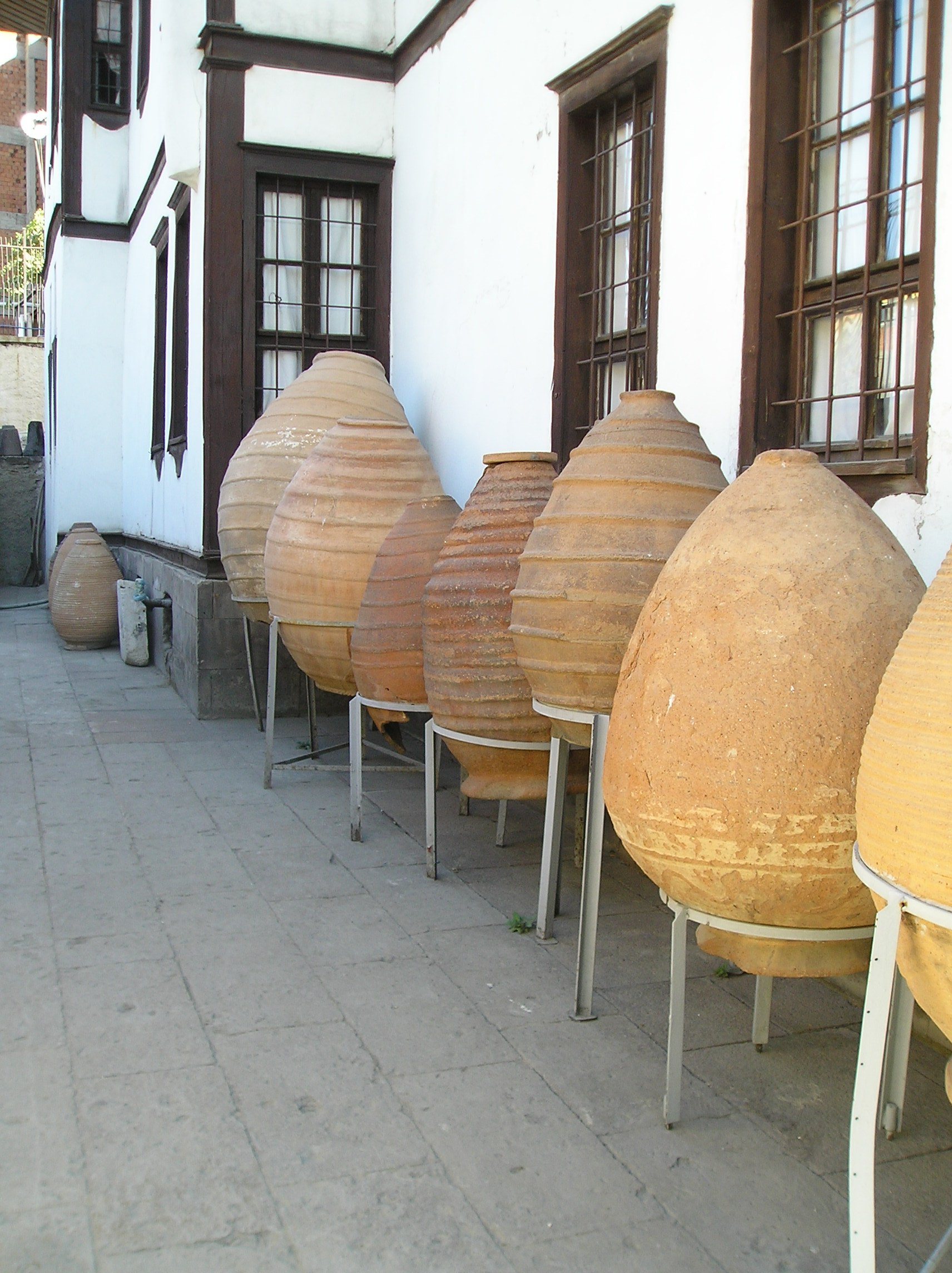 Yozgat Museum